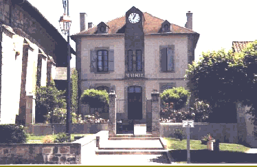 Mairie de Boisseuil Le Bourg 87220 - Boisseuil